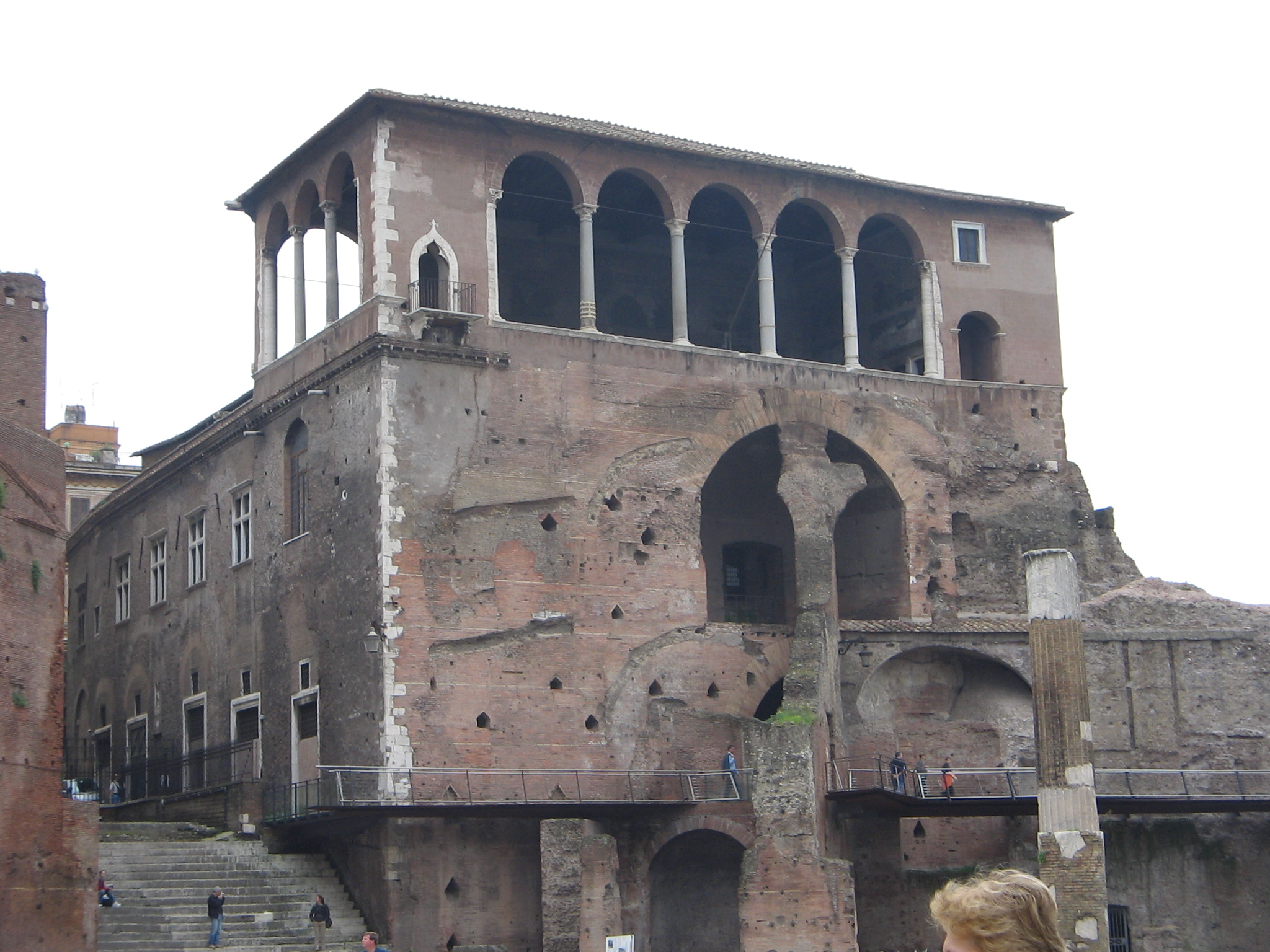 La loggia della casa dei Cavalieri di Rodi, sopra il Forum Traiani